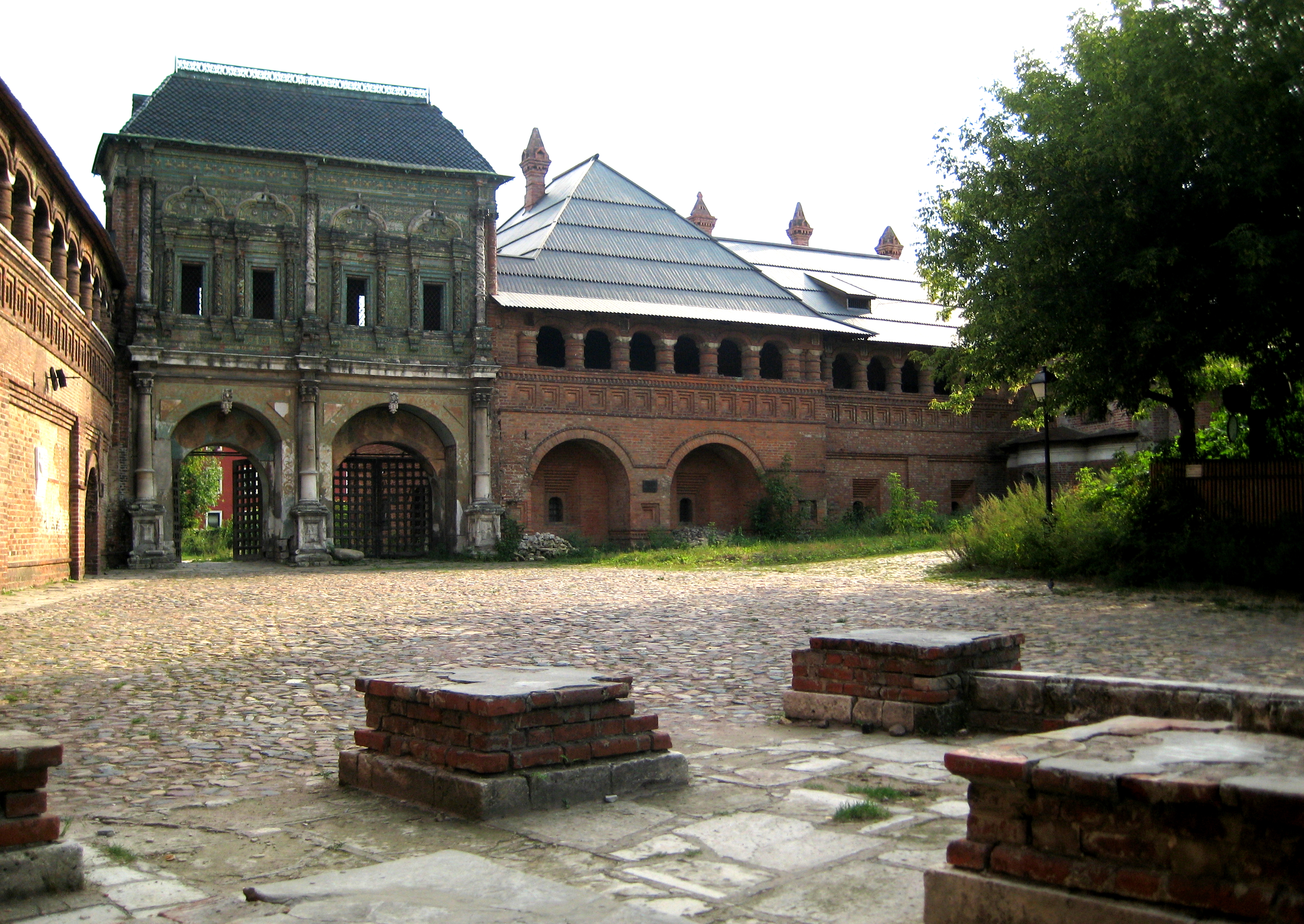 Крутицкое подворье